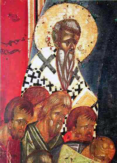 Фрагмент иконы "Успение Богородицы"/ Вверху - Иаков, брат Господень, епископ Иерусалимский. Ниже слева направо стоят апостолы Иаков Алфеев (?), Фома (?), Матфей, Варфоломей и Иоанн Богослов.